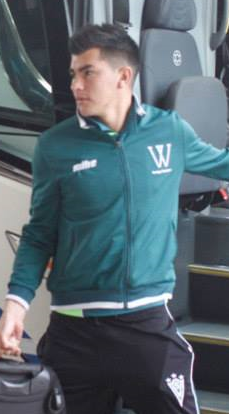 Fotografía del jugador de fútbol Nelson Saavedra en el Santiago Wanderers.